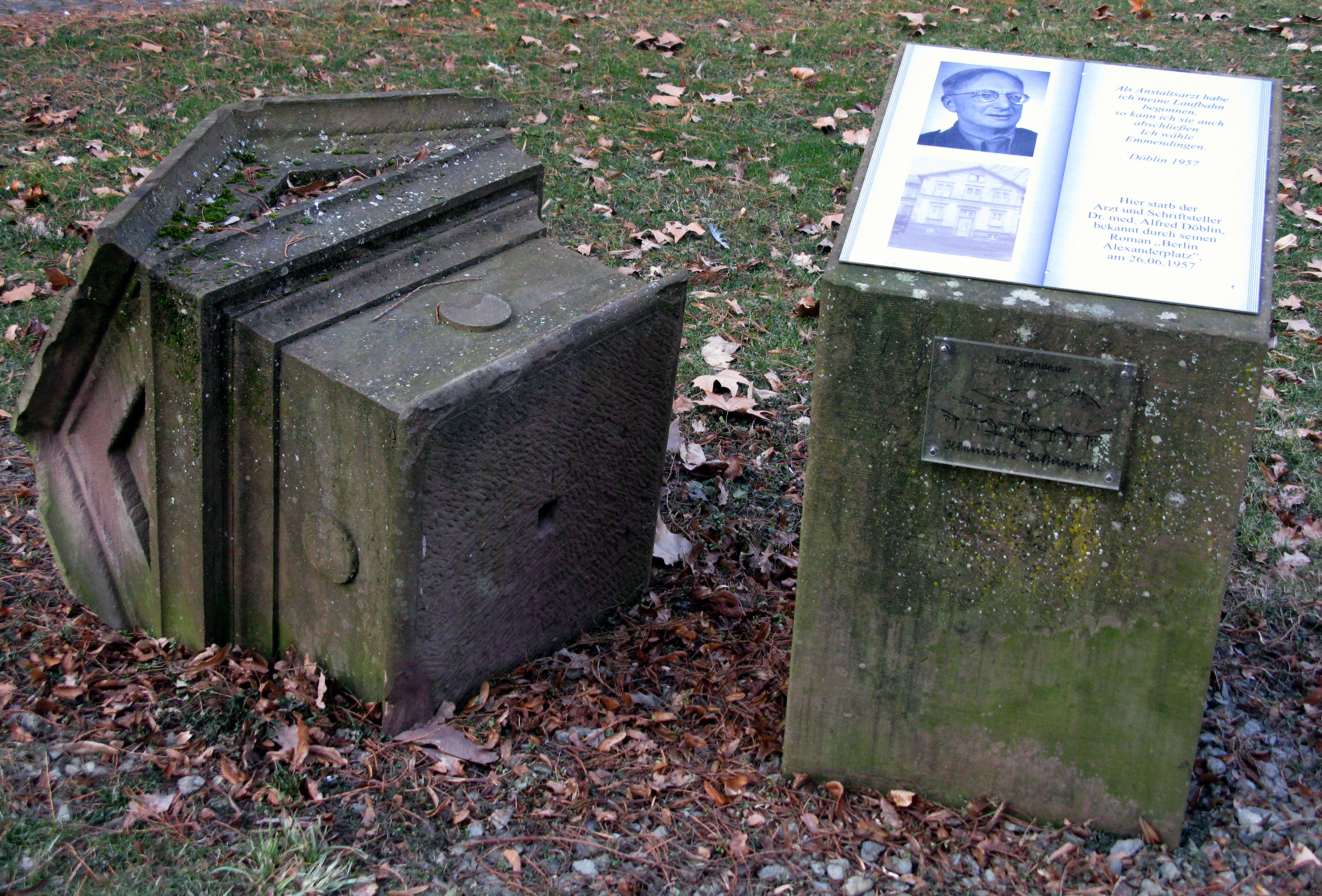 Döblin-Denkmal im Zentrum für Psychiatrie in Emmendingen